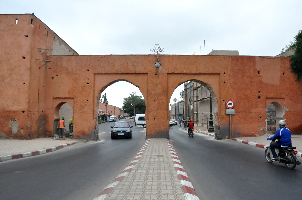 Puerta Bab Er-Robb,en la parte exterior de la ciudad de Marrakech, junto a la Puerta Bab Agnaou